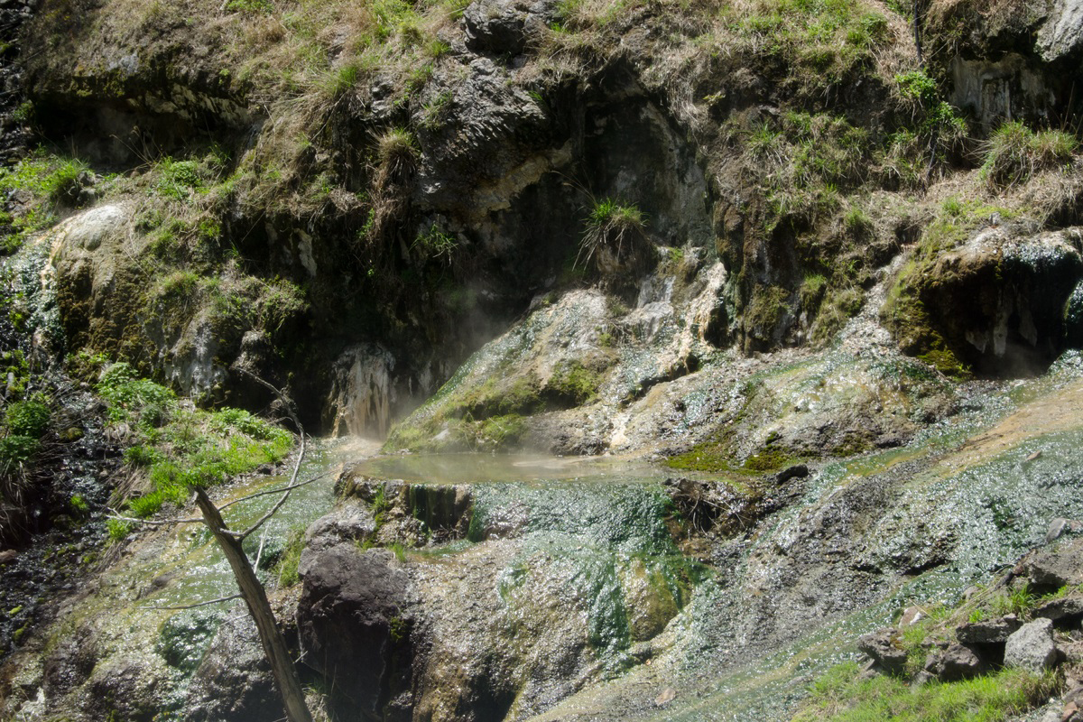 中の湯温泉（移転前）の露天風呂跡地。